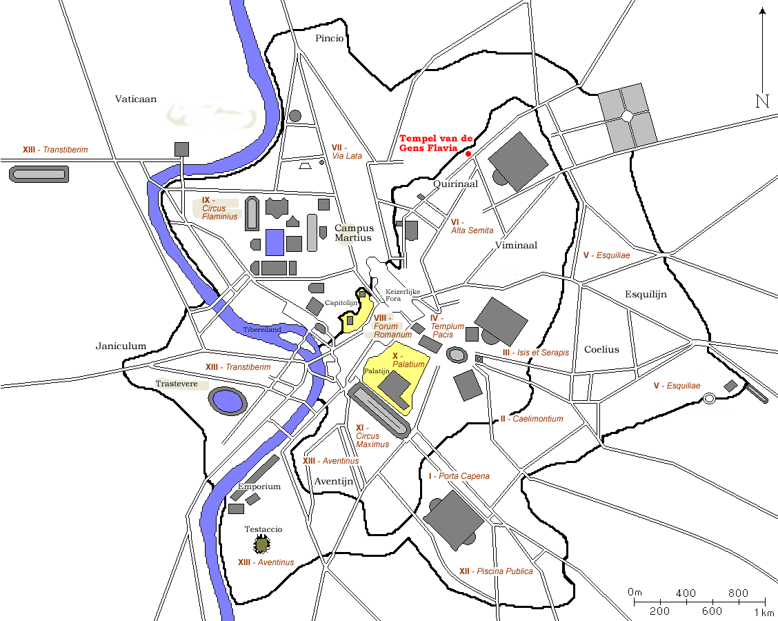 Kaart van antiek Rome waarop de Tempel van de gens Flavia is uitgelicht. Kaart is afkomstig van FR:wiki en door mij naar een Nederlandse versie bewerkt. Auteurs: nl::fr:User:ColdEel en Gebruiker:Joris1919